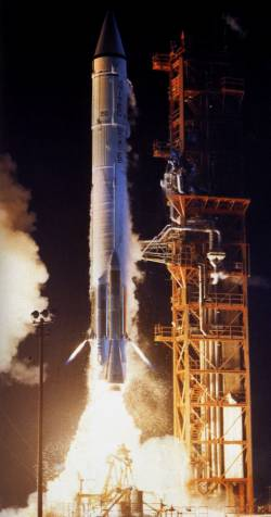 Mariner 6 lift-off - NASA